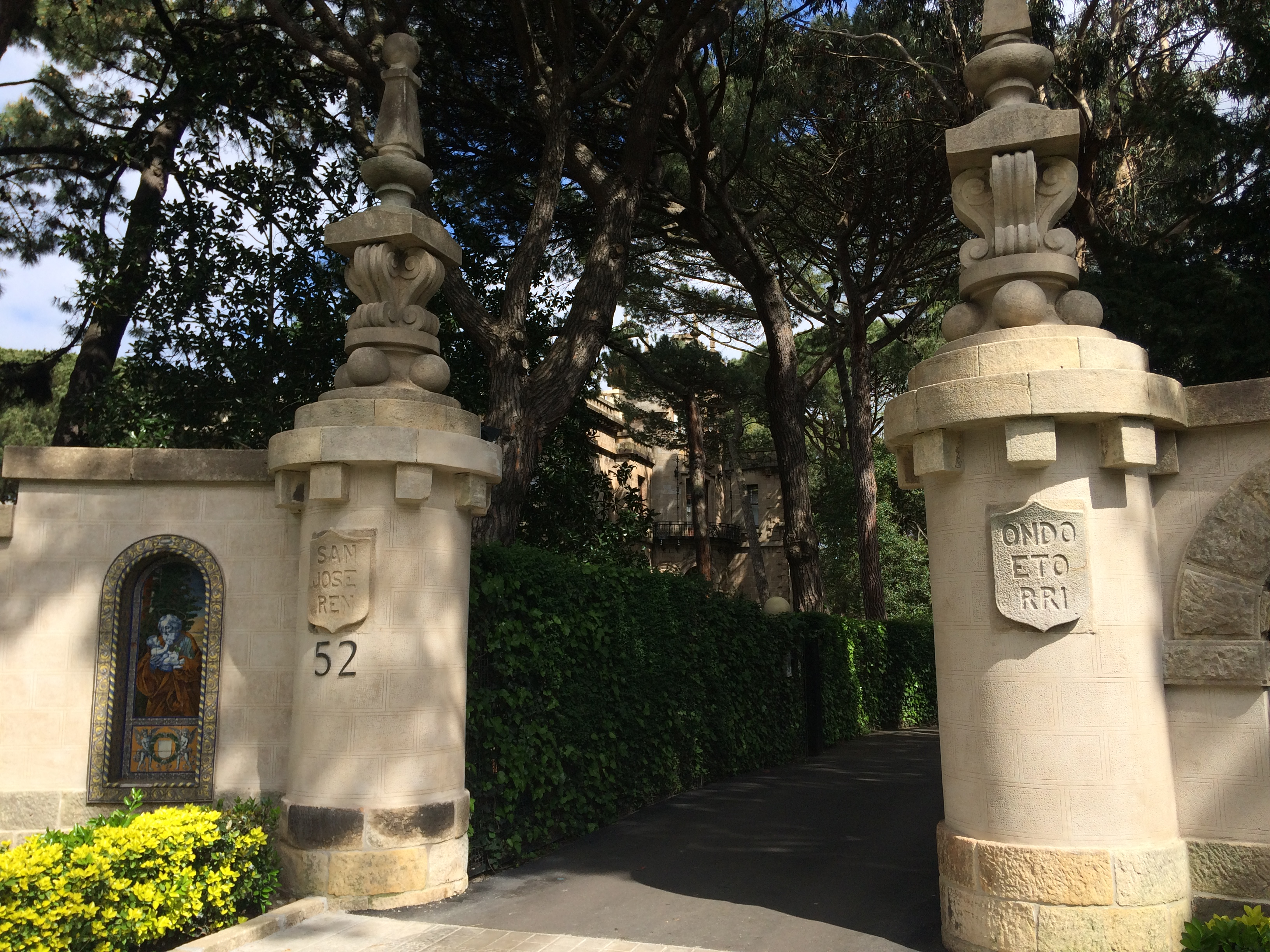 Entrada al Palacio San Joseren, Gecho.